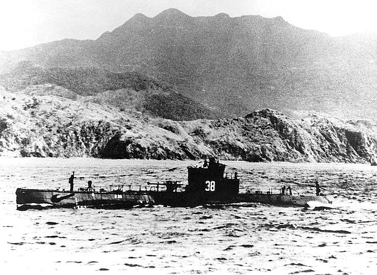 US Navy-U-Boot USS S-38 in den späten 1930er